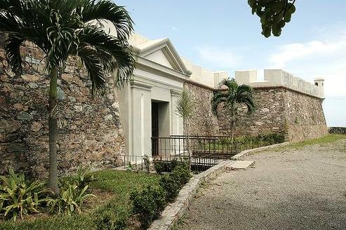 Fortín El Vigia, La Guaira, Venezuela.